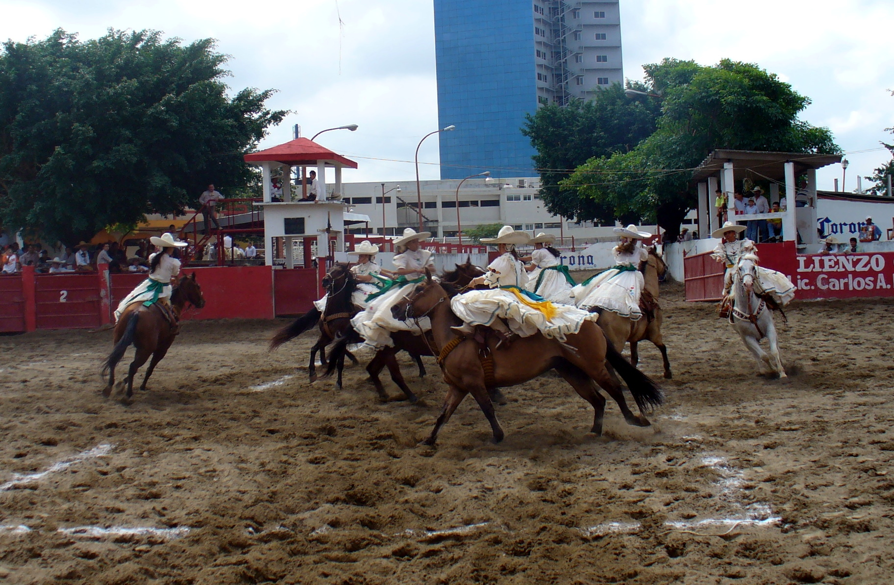 Escaramuzas charras en el centro del ruedo